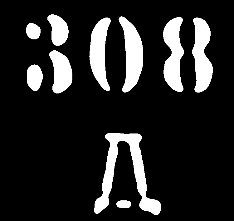 Київський автономер (1917 р.) схематичне зображення загального вигляду номерного знаку